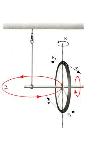 Einseitig aufgehängter Kreisel während Präzession, sowie dabei auftretende Corioliskräfte